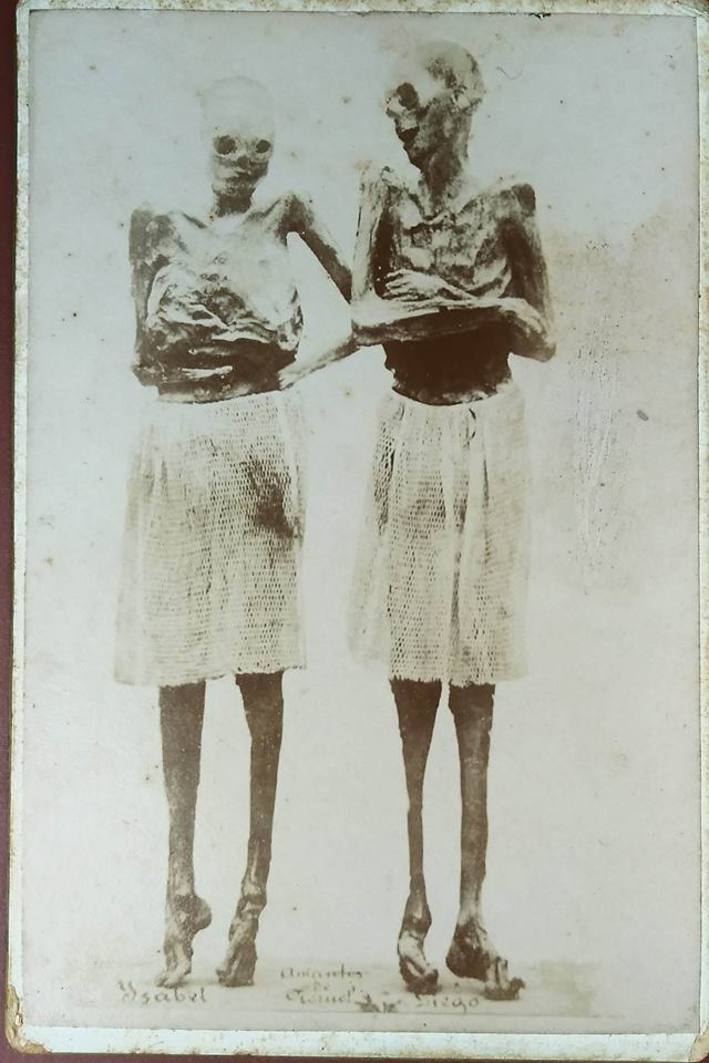 Carte de visite que es venia a la segona meitat del s. XIX a Terol